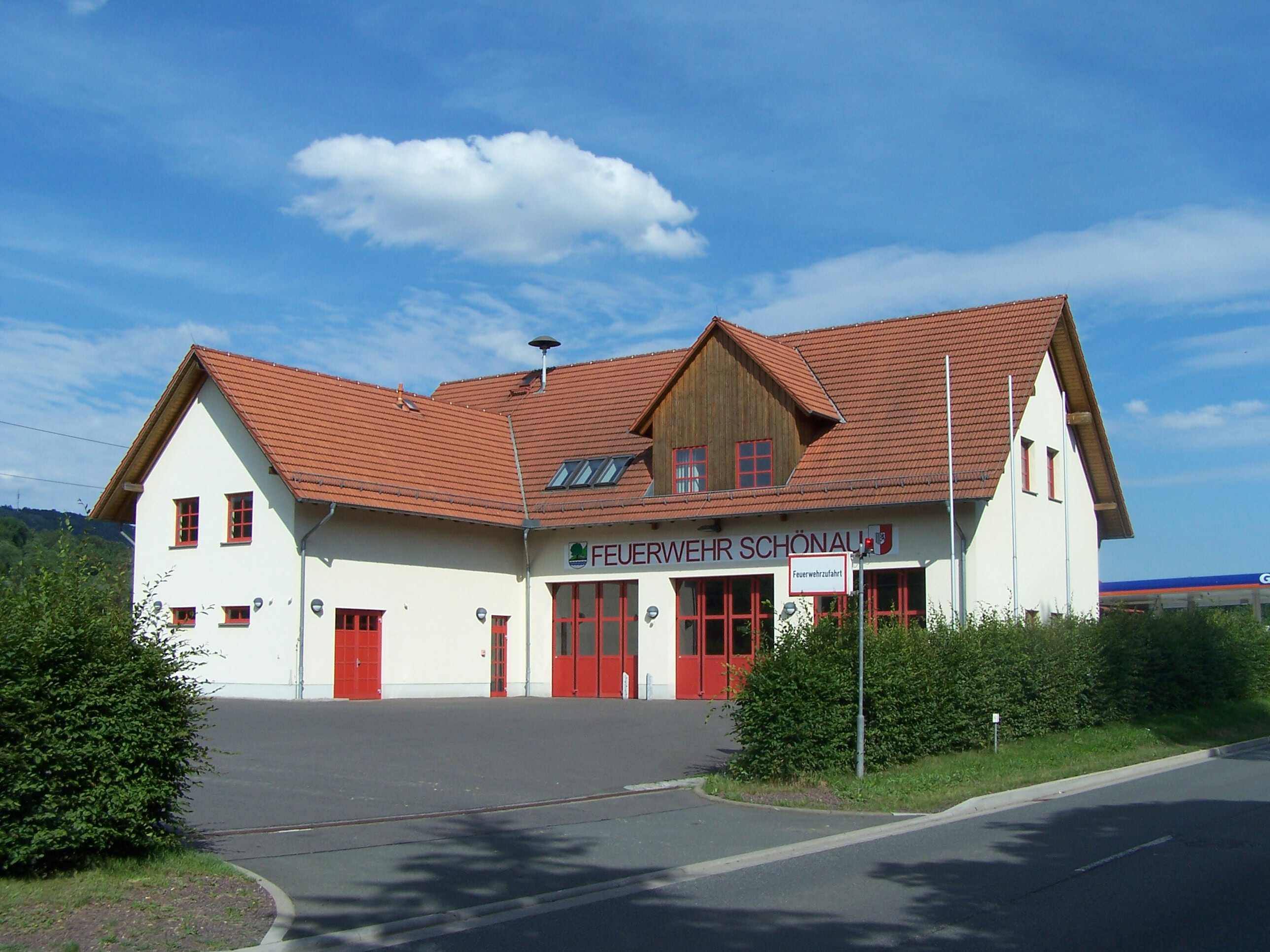 Das örtliche Feuerwehrquartier in Schönau/Hörsel.